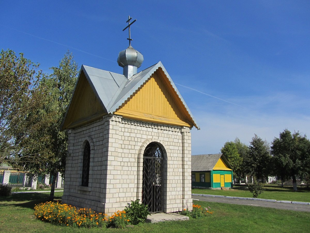 Буда-Кашалёва. Капліца